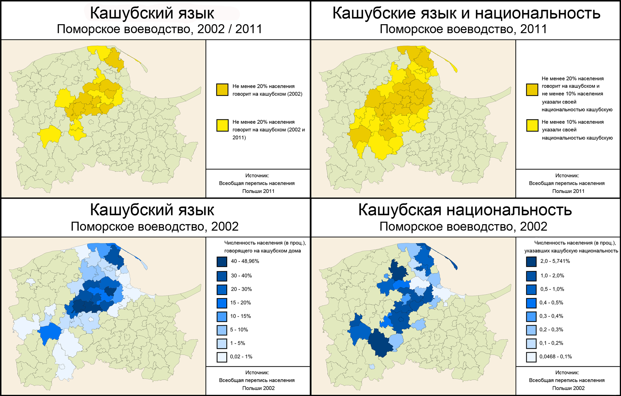 Кашубские язык и национальность (2002 —2011)